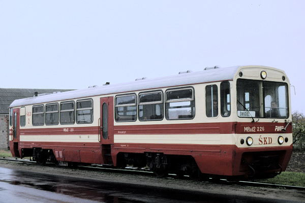 Triebwagen MBxd2 226 in Ziemin